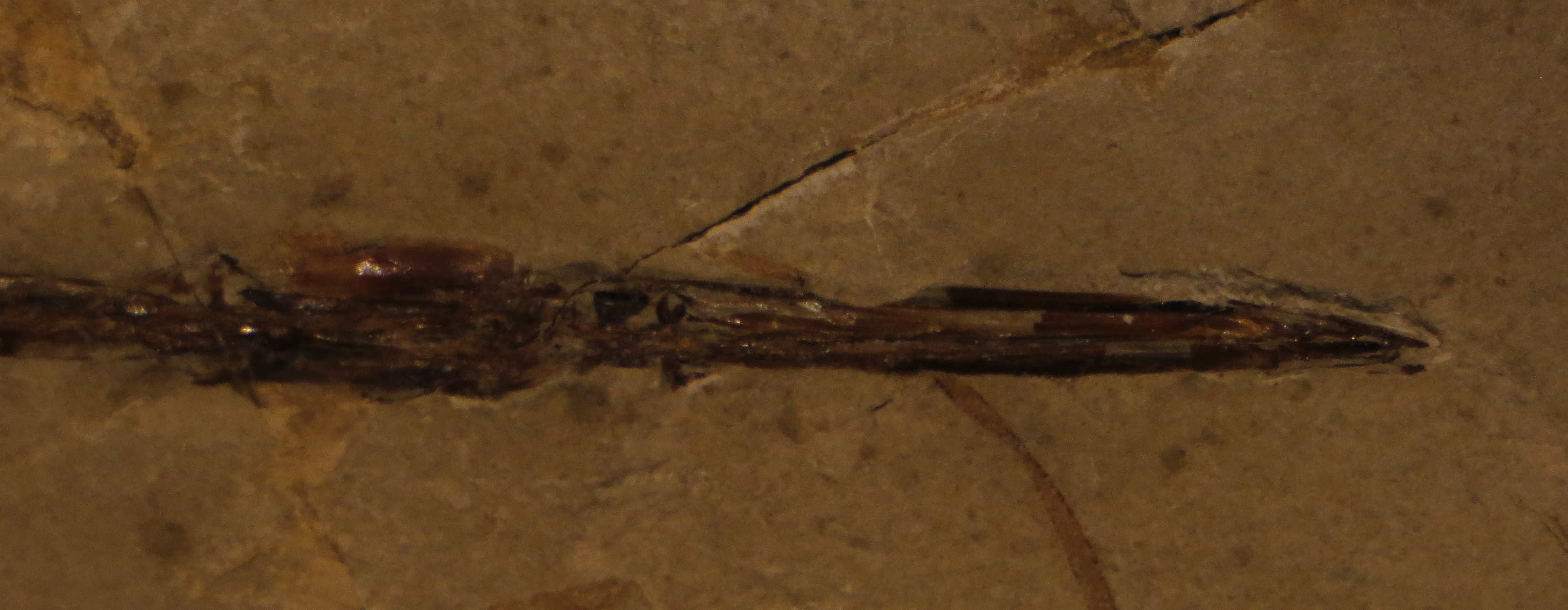 Fossil of Fistularioides- Museo dei Fossili di Bolca